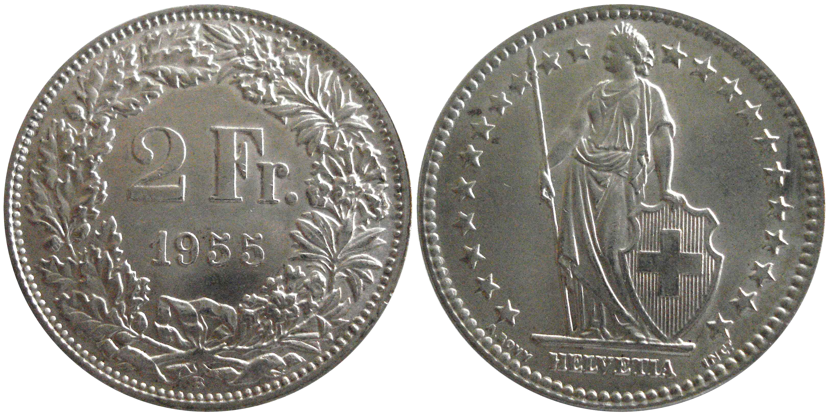 2 Francs 1955, Ag 835, toute neuve...